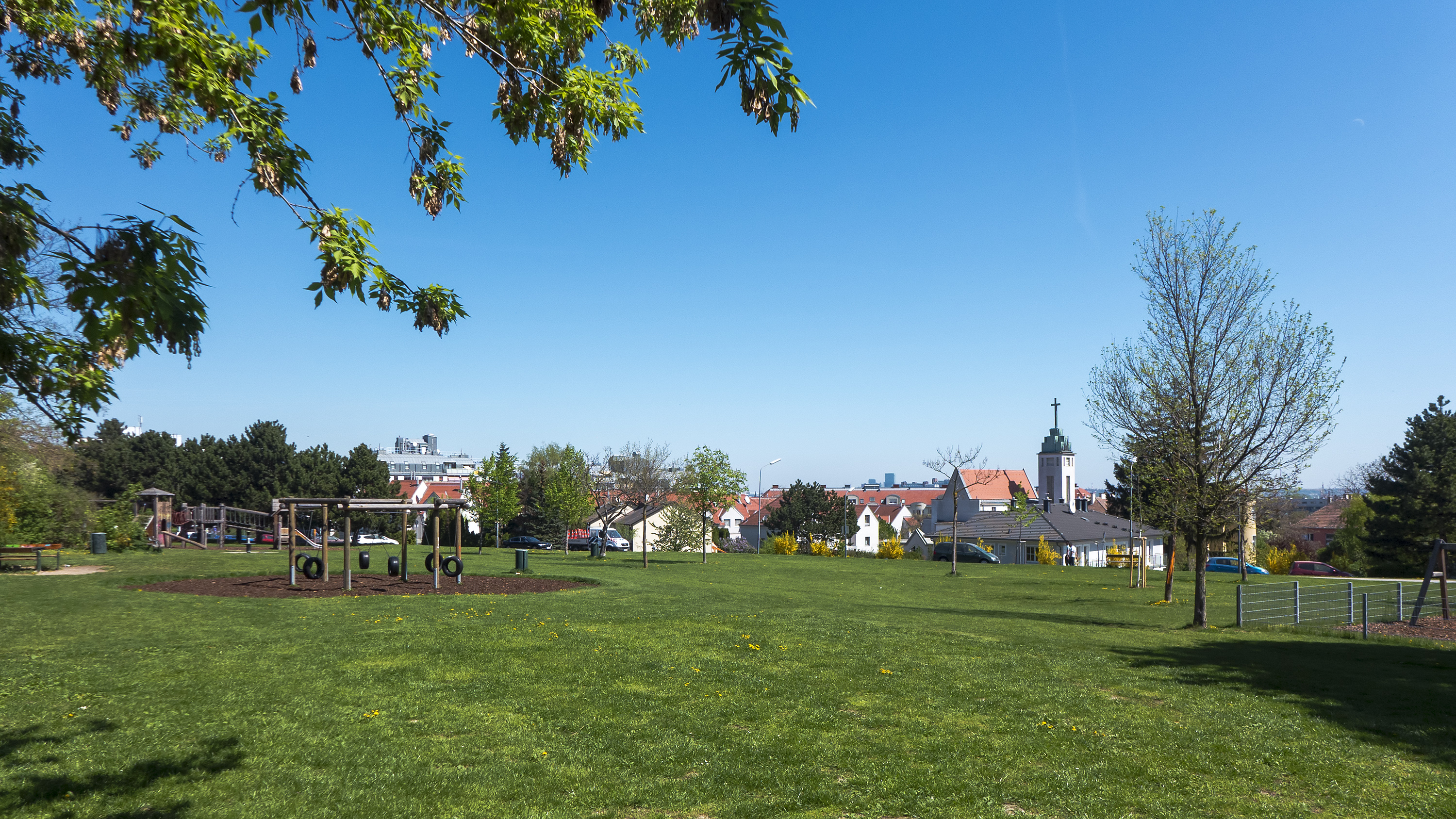 Margarethe-Ottillinger-Park in Wien 23